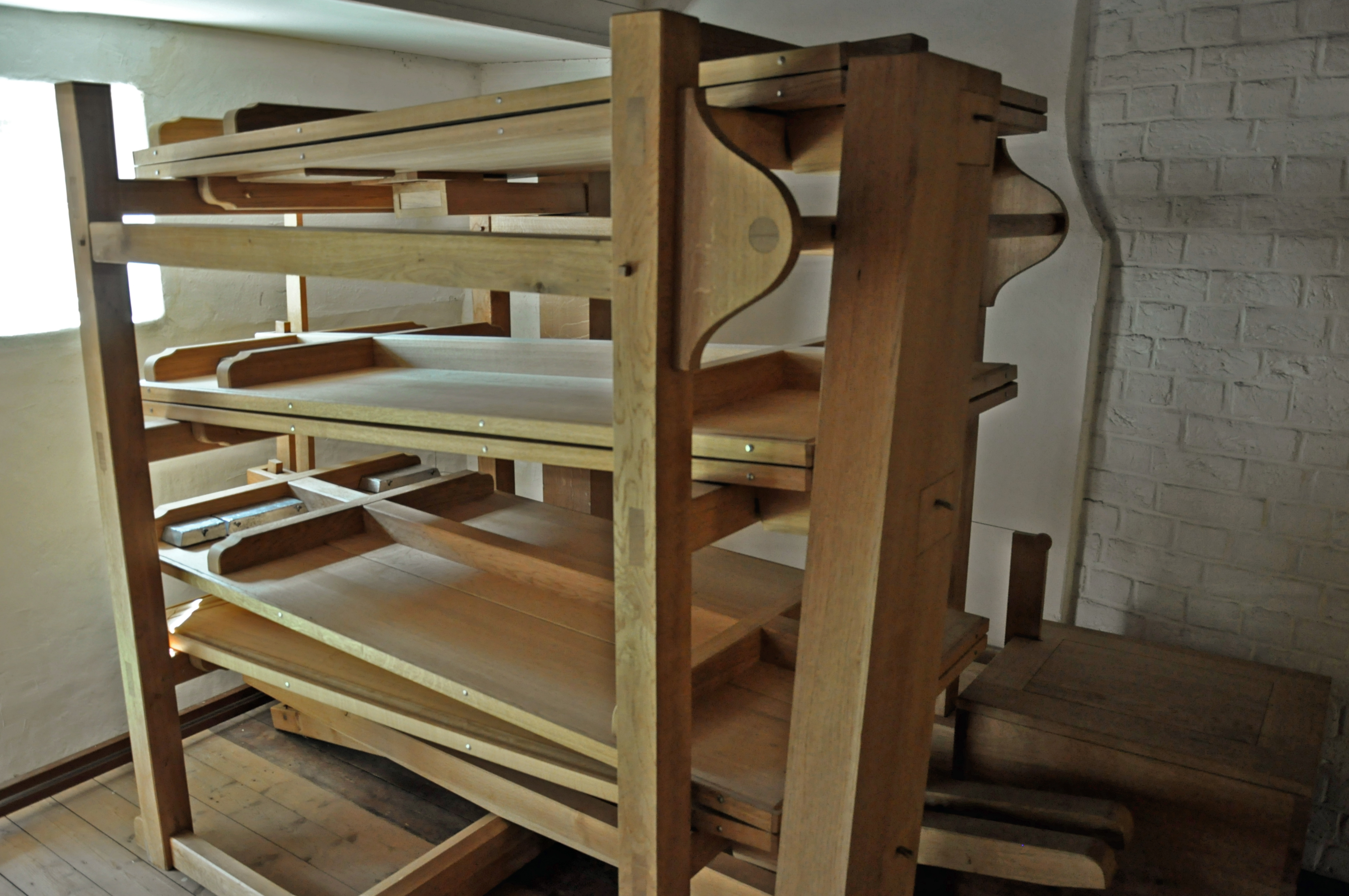 Balganlage Orgel in St. Mauritius, Hollern, Landkreis Stade